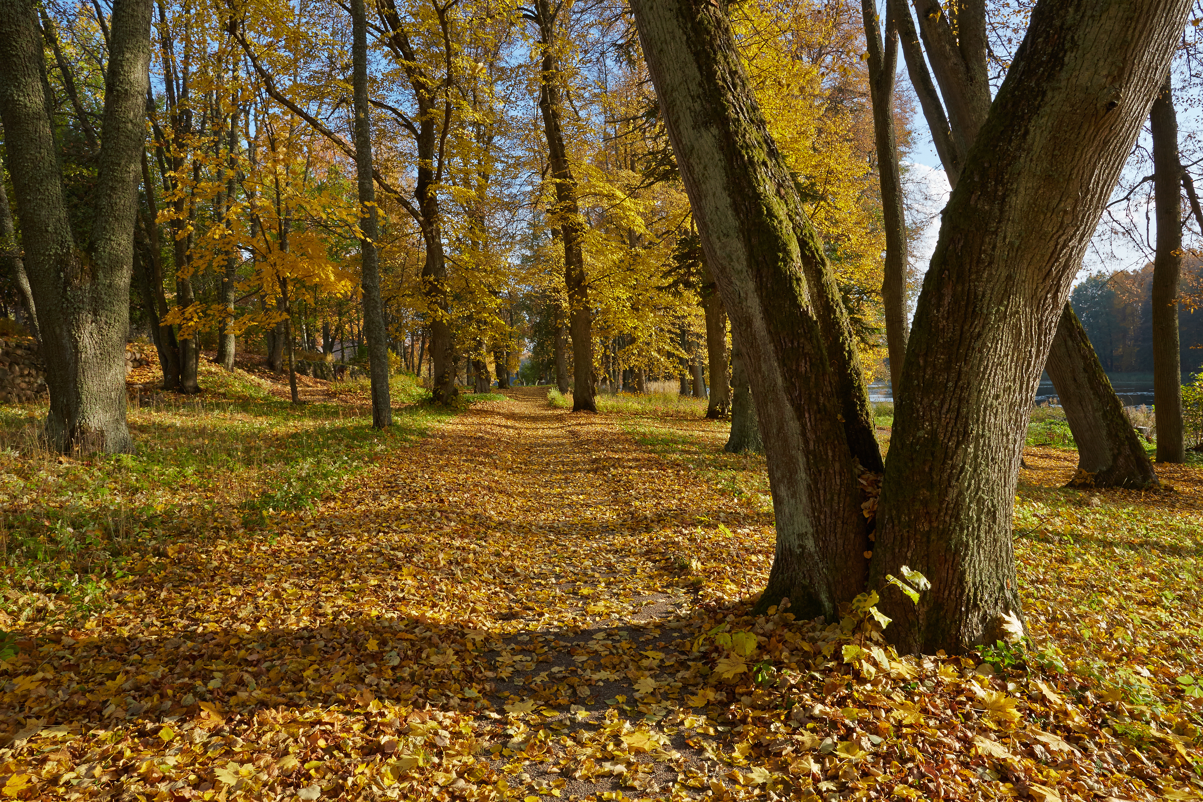 Väimela mõisa park